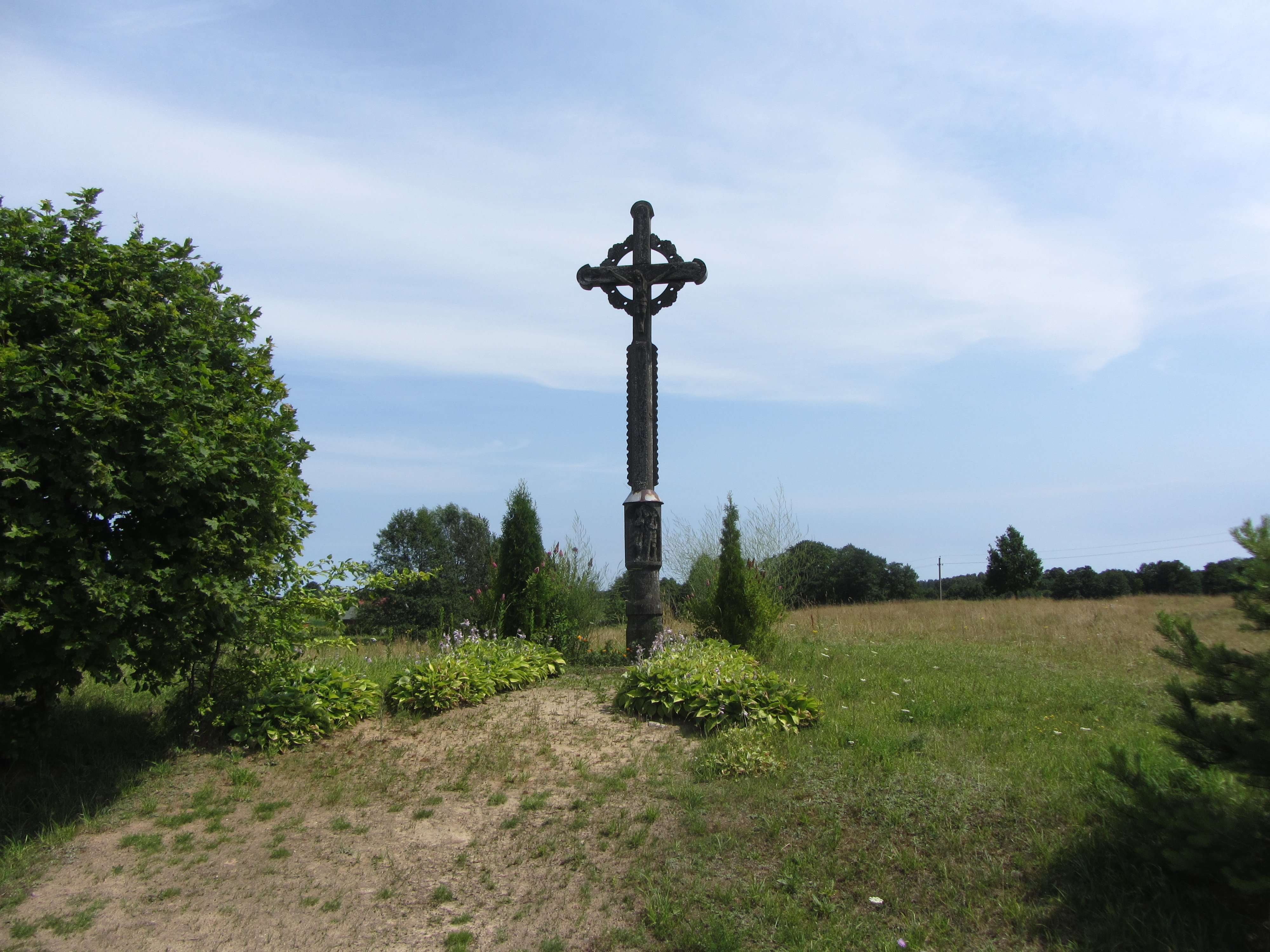 Ricieliai, Lithuania